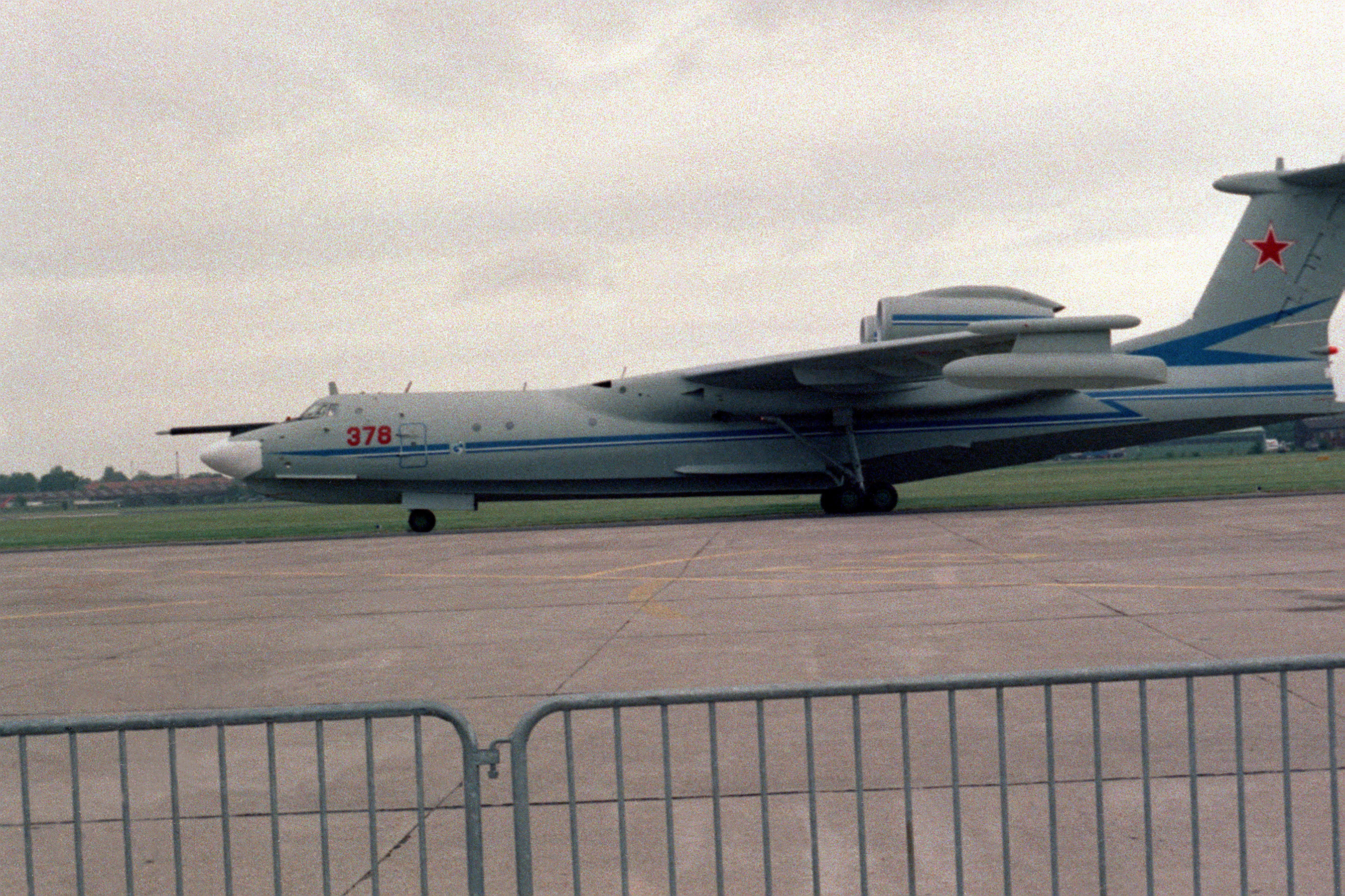 Eine Berijew Be-42 (A-40 Albatros) auf der Pariser Luftfahrtschau 1991